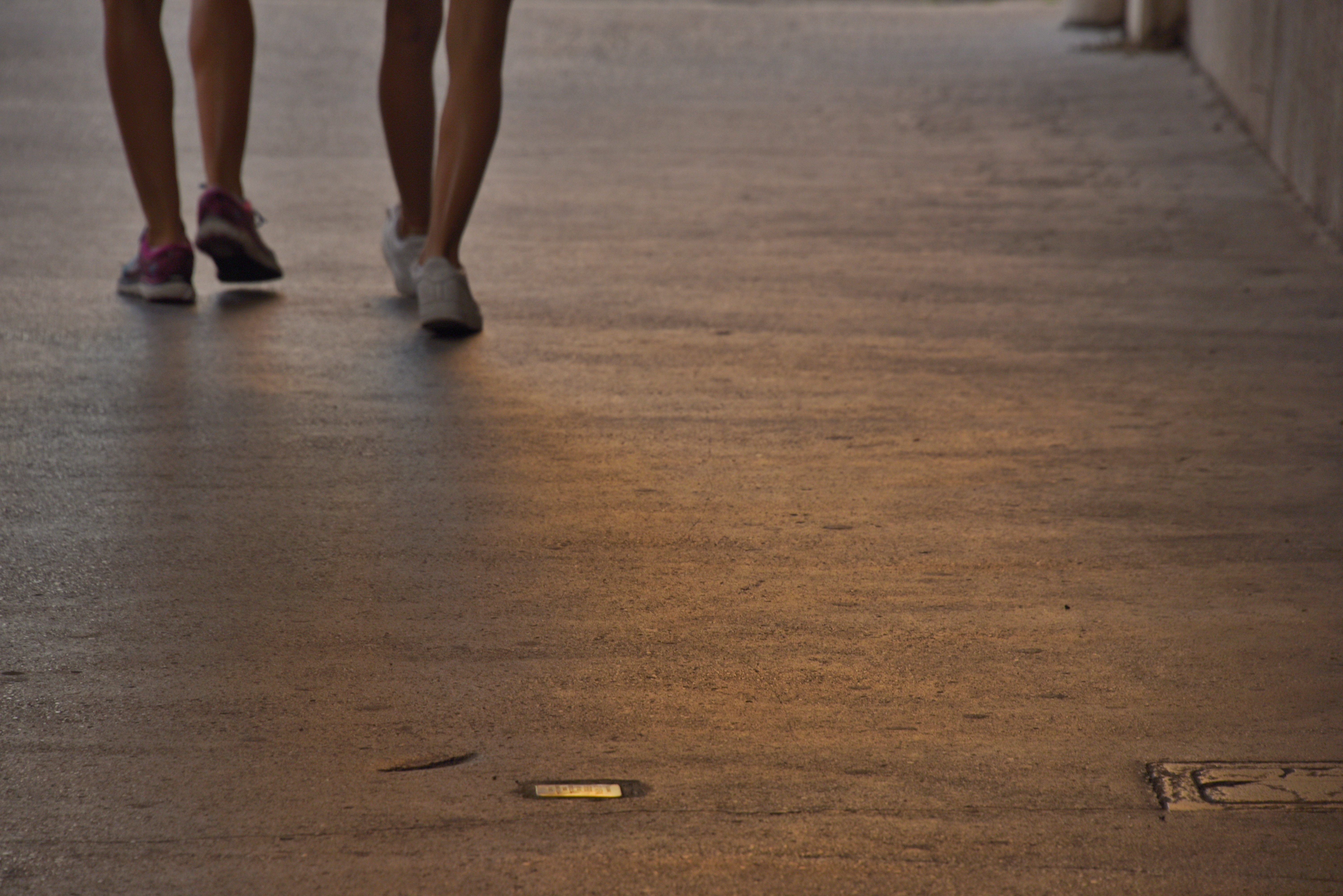 Stolperstein in Triest